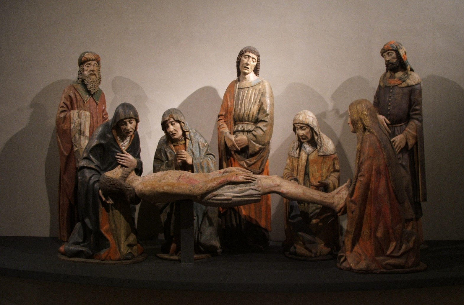 Museo Civico d'Arte Antica di Torino - gruppo ligneo "Compianto sul Cristo morto" - Domenico Merzagora (Maestro di Santa Maria Maggiore in Val Vigezzio), XV secolo